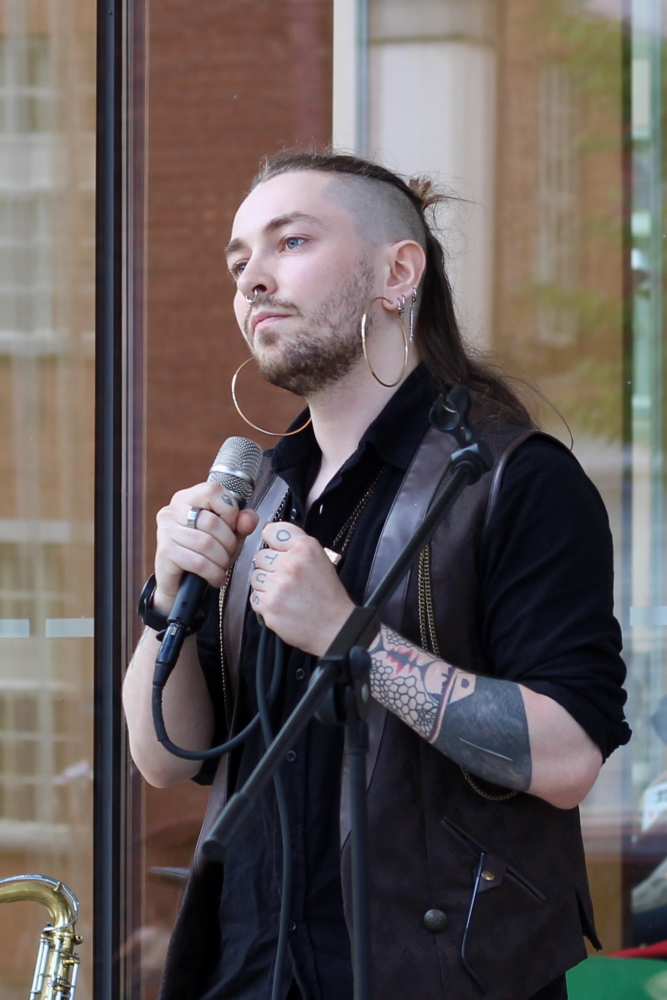 Runoilija Susinukke Kosola esiintymässä Go Runo Go! -tapahtumassa Turussa 6.7.2019